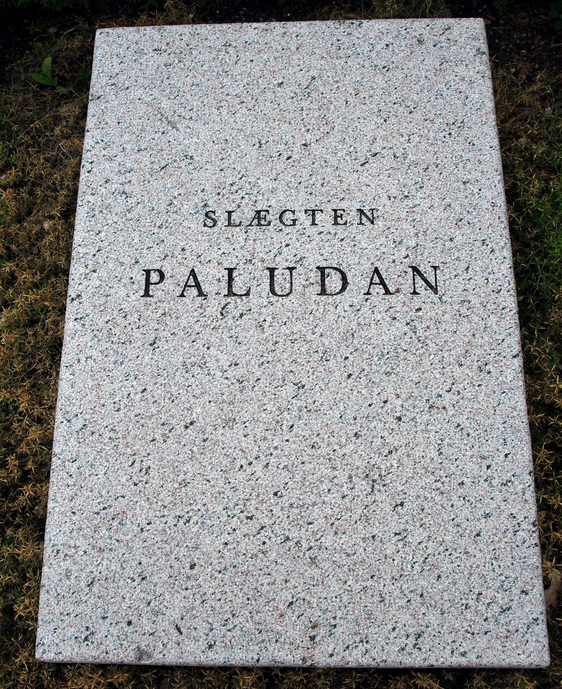 Gravsten for slægten Paludan. Placeret på Viborg Kirkegård.